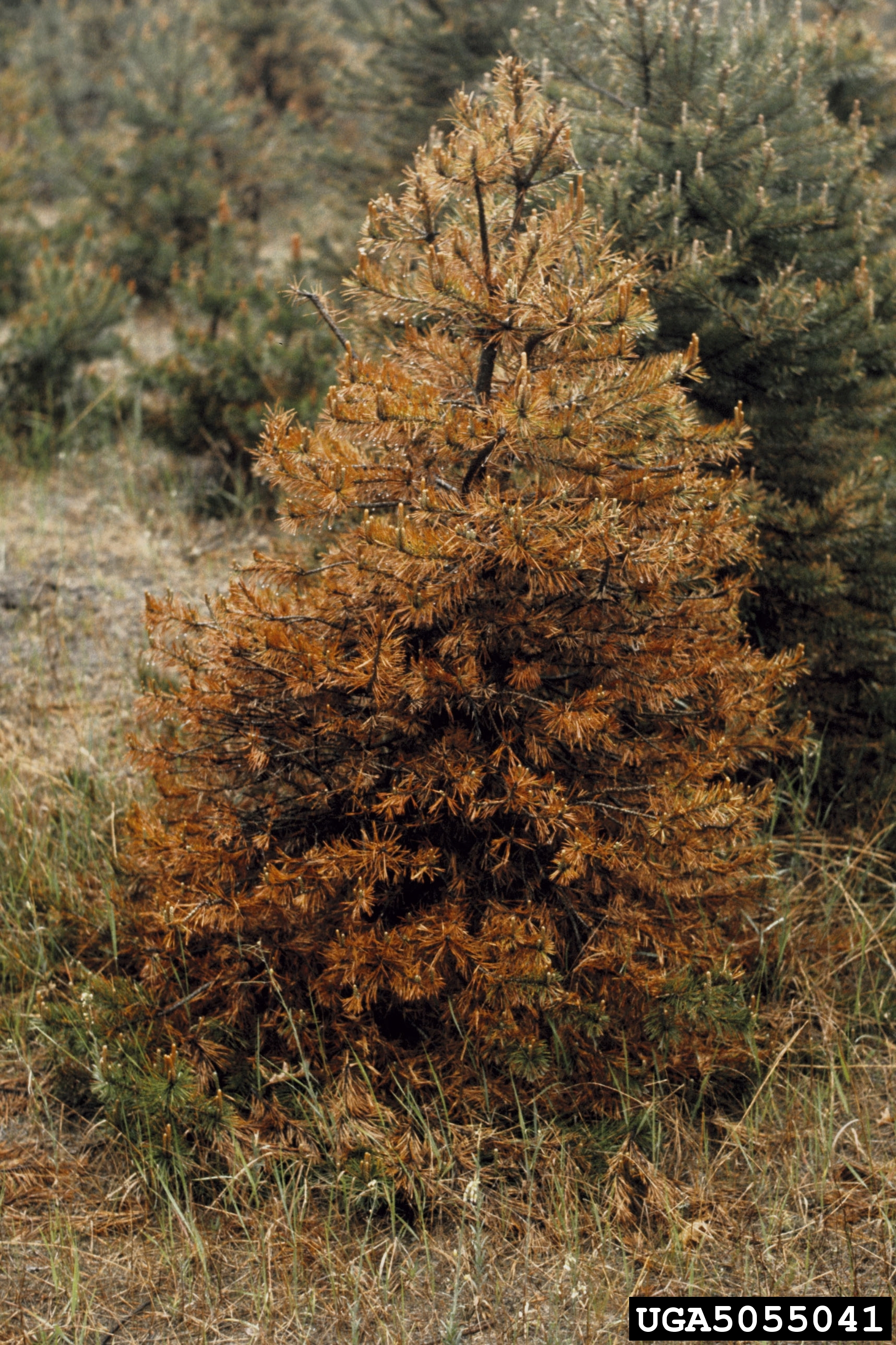 Durch den Pilz Lophodermium seditosum verursachte Baumkrankheit Kiefernschütte.